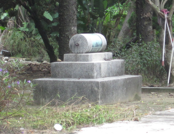 中文（台灣）: 永康糖廠壓路滾輪紀念碑。